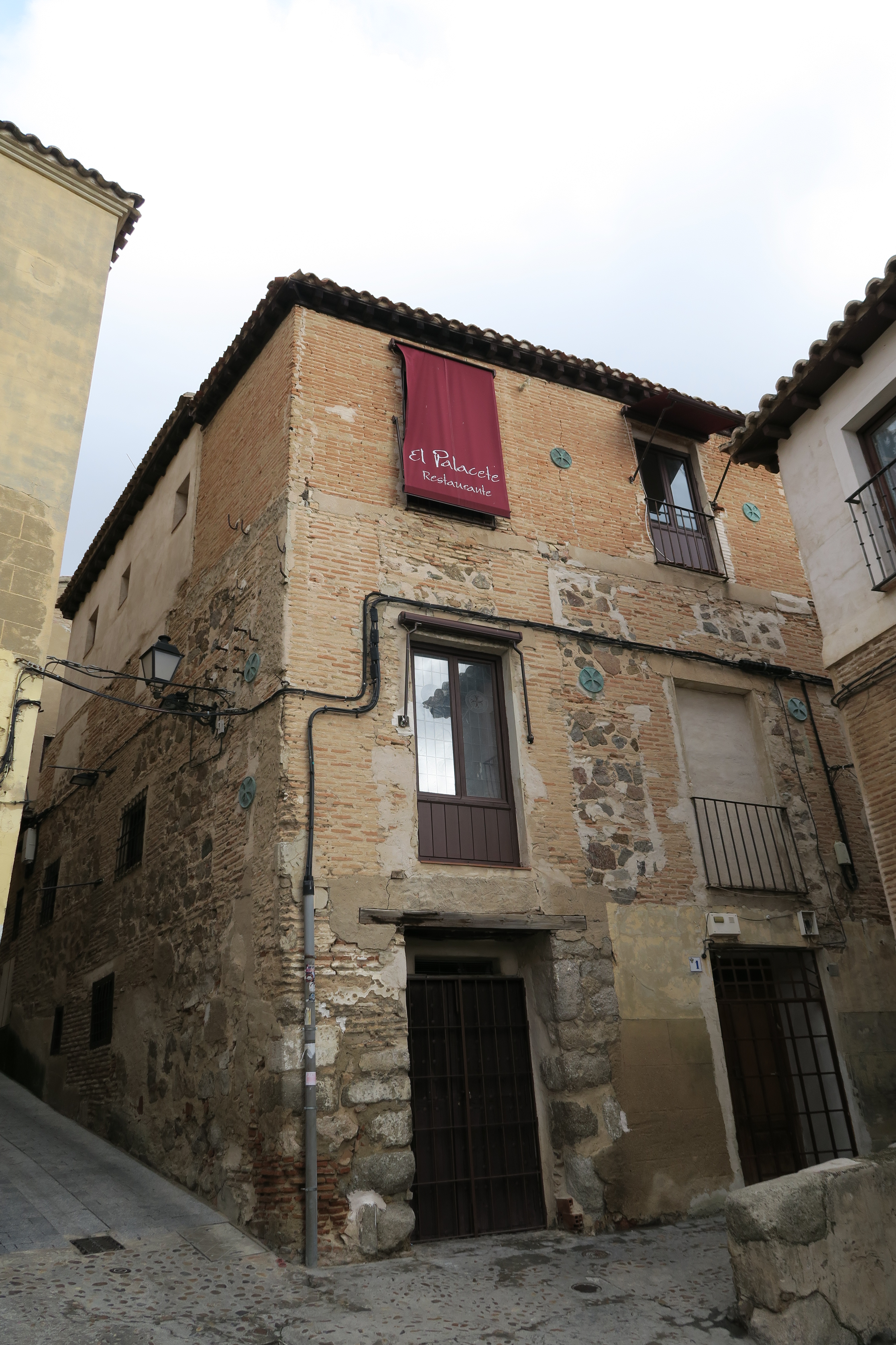 Fachada Casa del Temple, Toledo